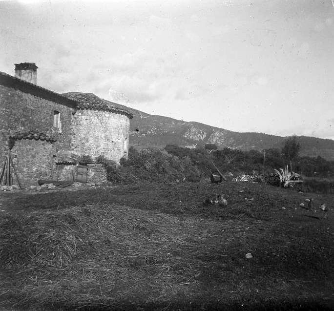 Santa Llúcia del Segueró o Maials. Josep Salvany i Blanch (1920)